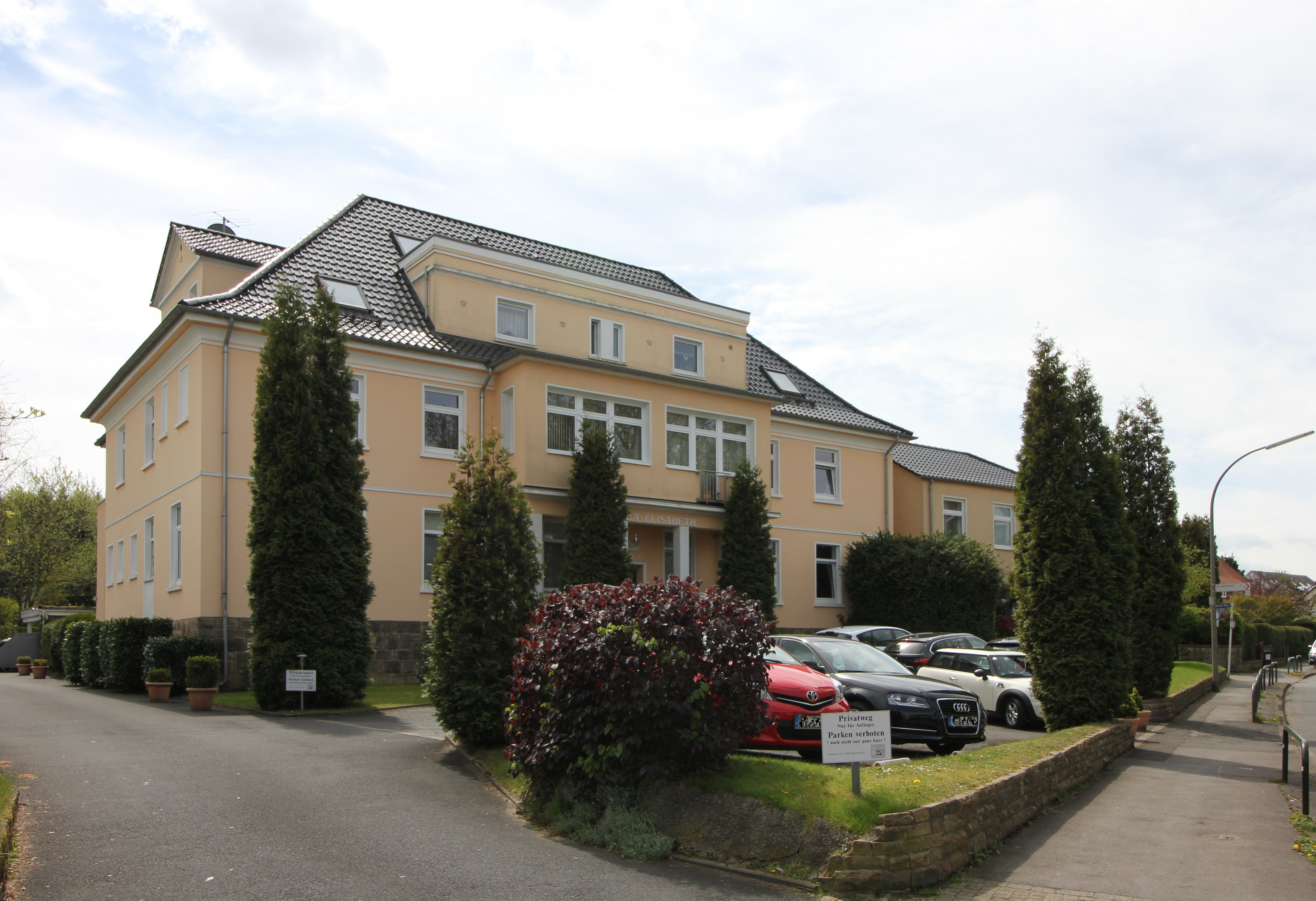 Das 1927 gebaute Elisabeth-Heim für Säuglinge und Kinder, heute Wohnhaus.